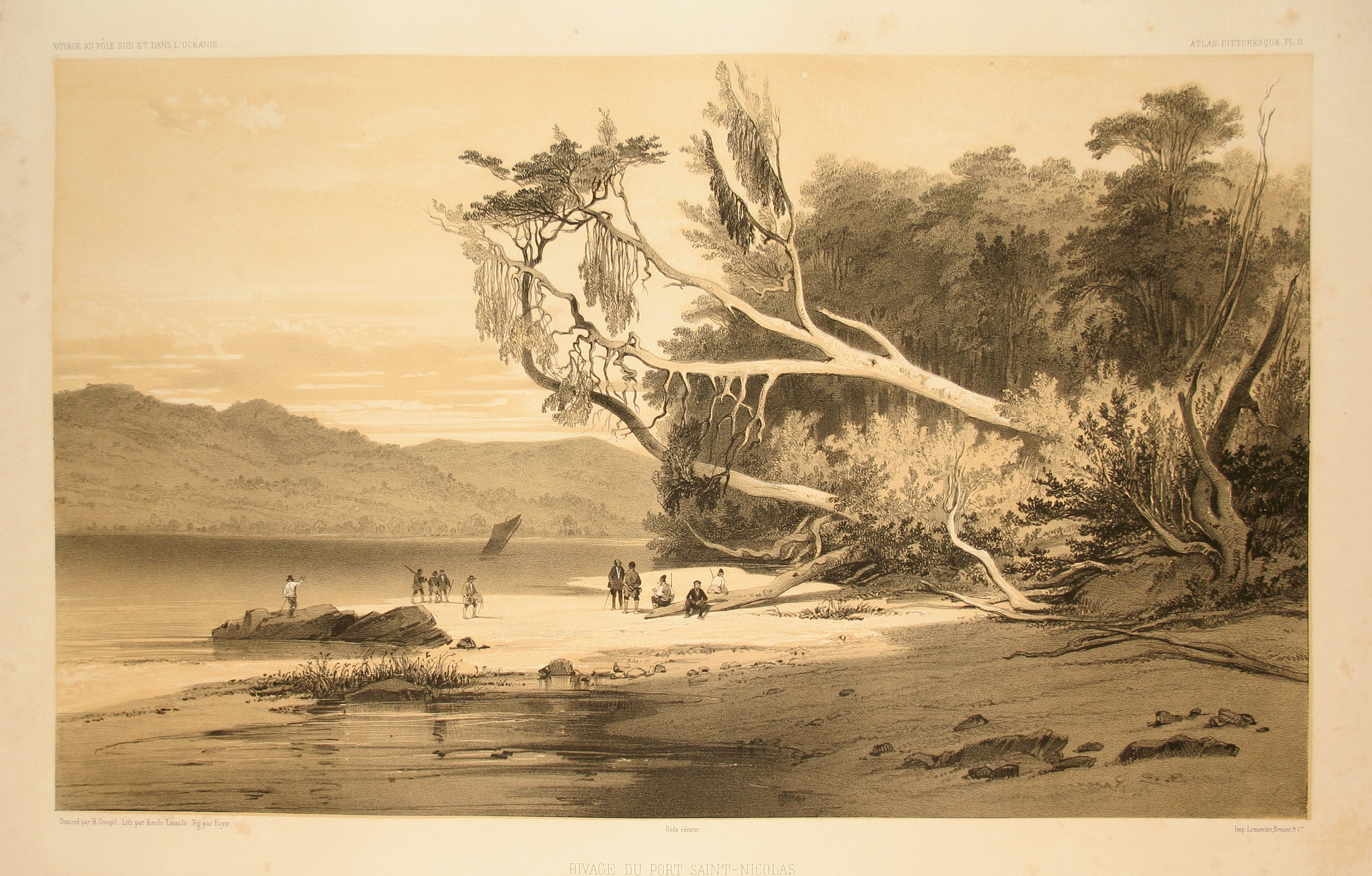 Rivage du port Sain-Nicolas, détroit de Magellan. Atlas pittoresque, planche 11